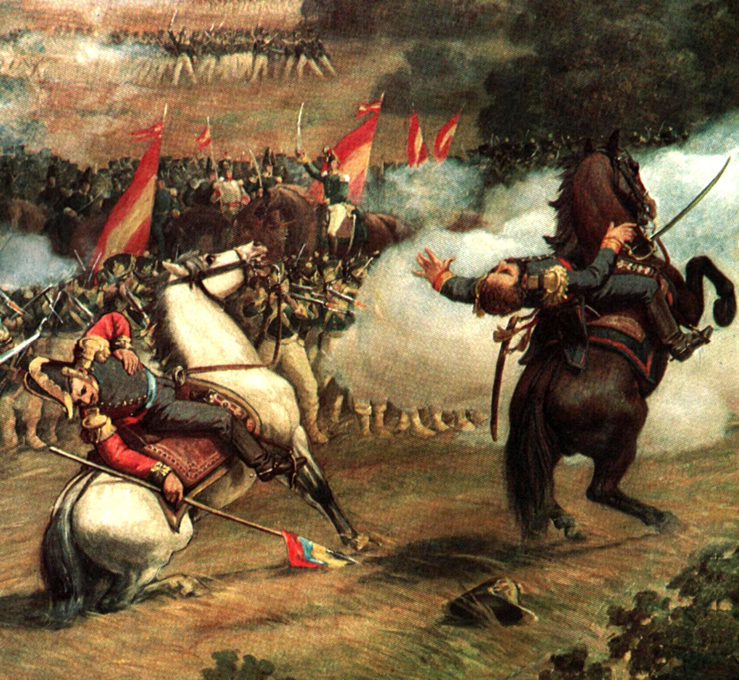 Fragmento de la Batalla de Carabobo. Oleo sobre tela. Palacio Federal Legislativo, Caracas - Venezuela